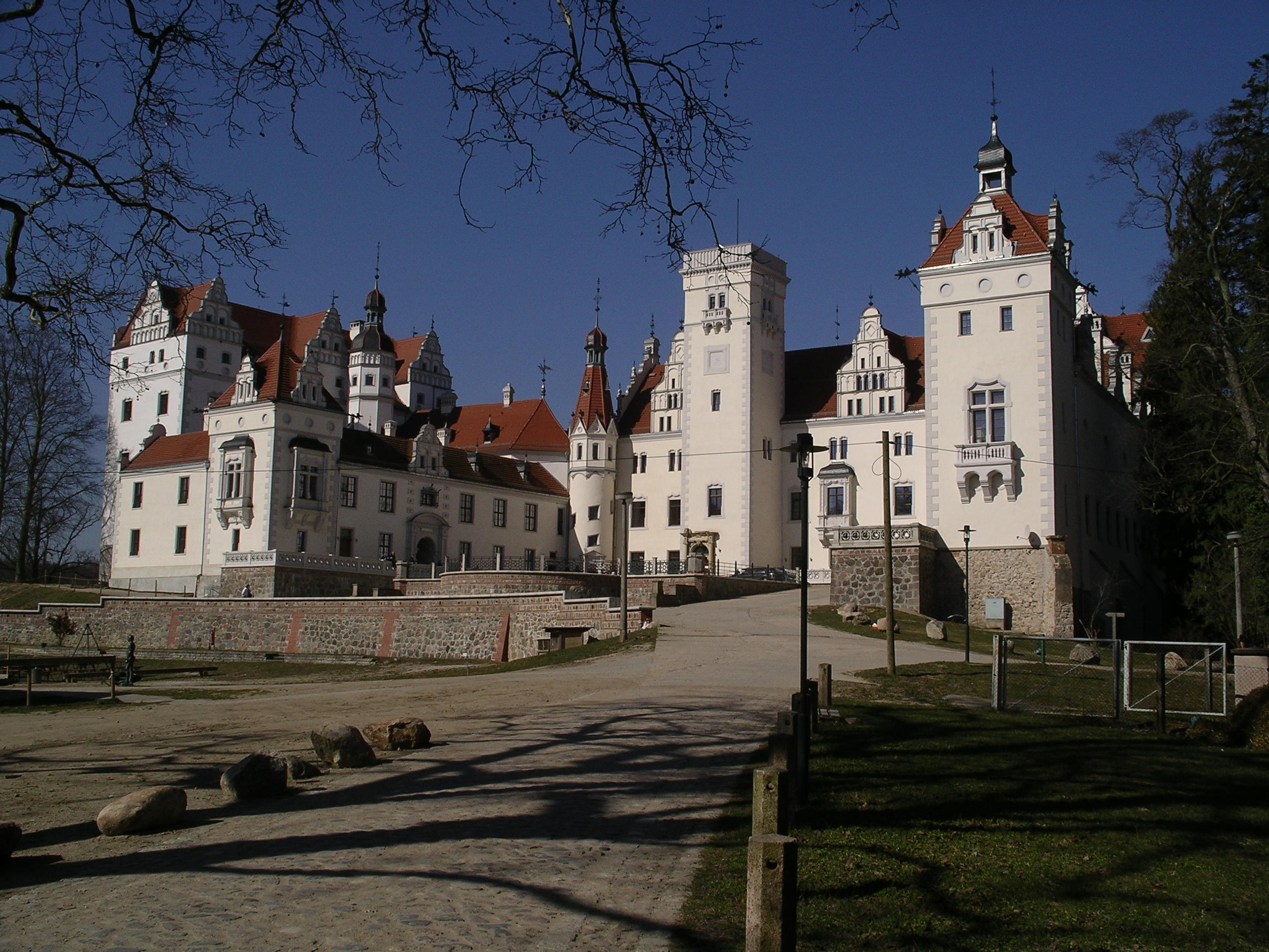 Schloss Boitzenburg in der Uckermark